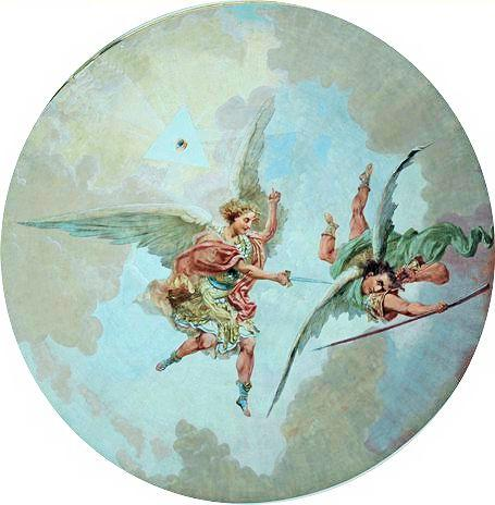 Fresque de la voute de la chapelle des Ursulines de Trois-Rivières, de l'artiste italien Luigi Capello, 1897. Elle représente le combat entre le Bien et le Mal, soit saint Michel Archange contre Lucifer.